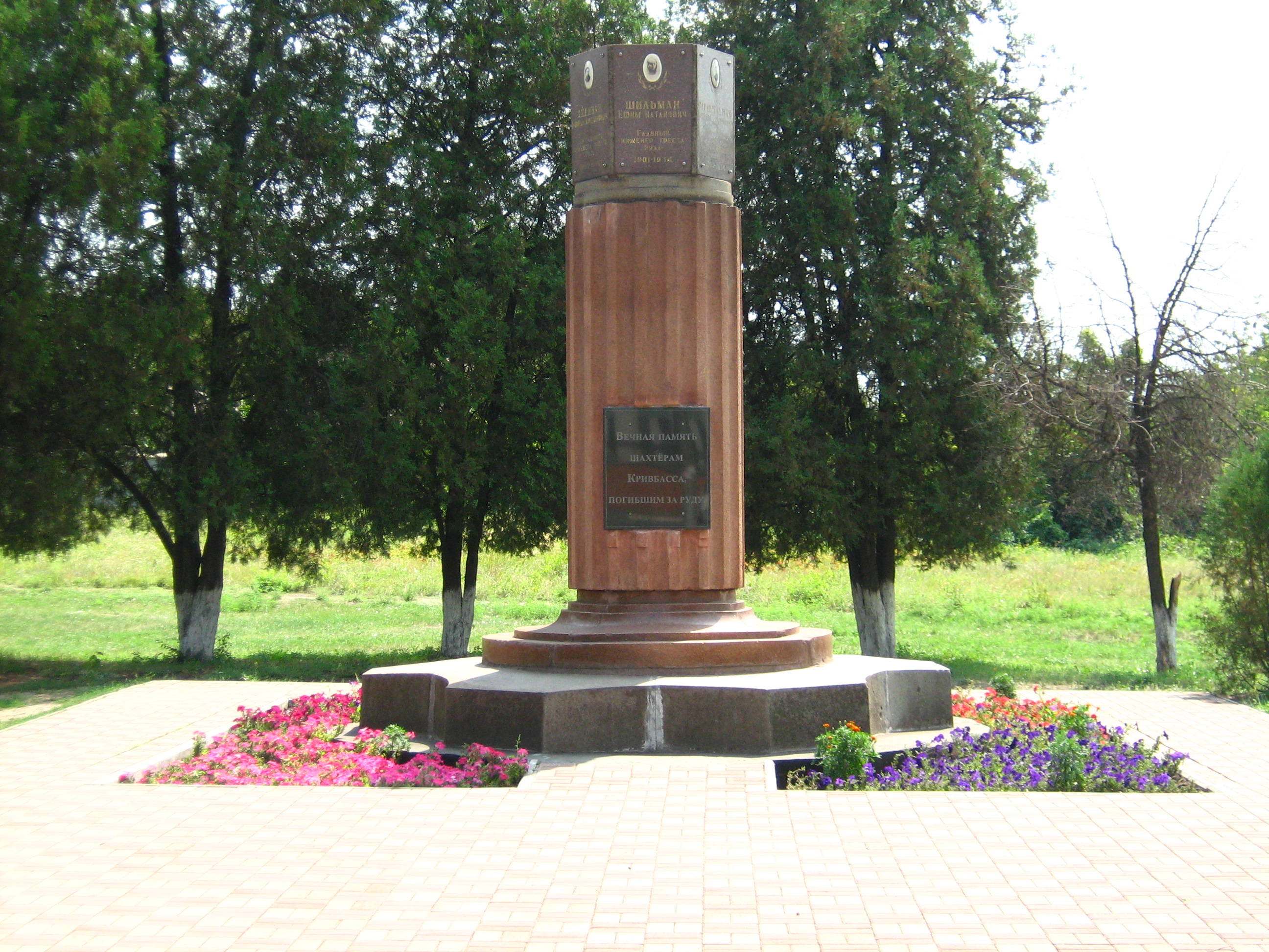 Пам’ятник загиблим шахтарям